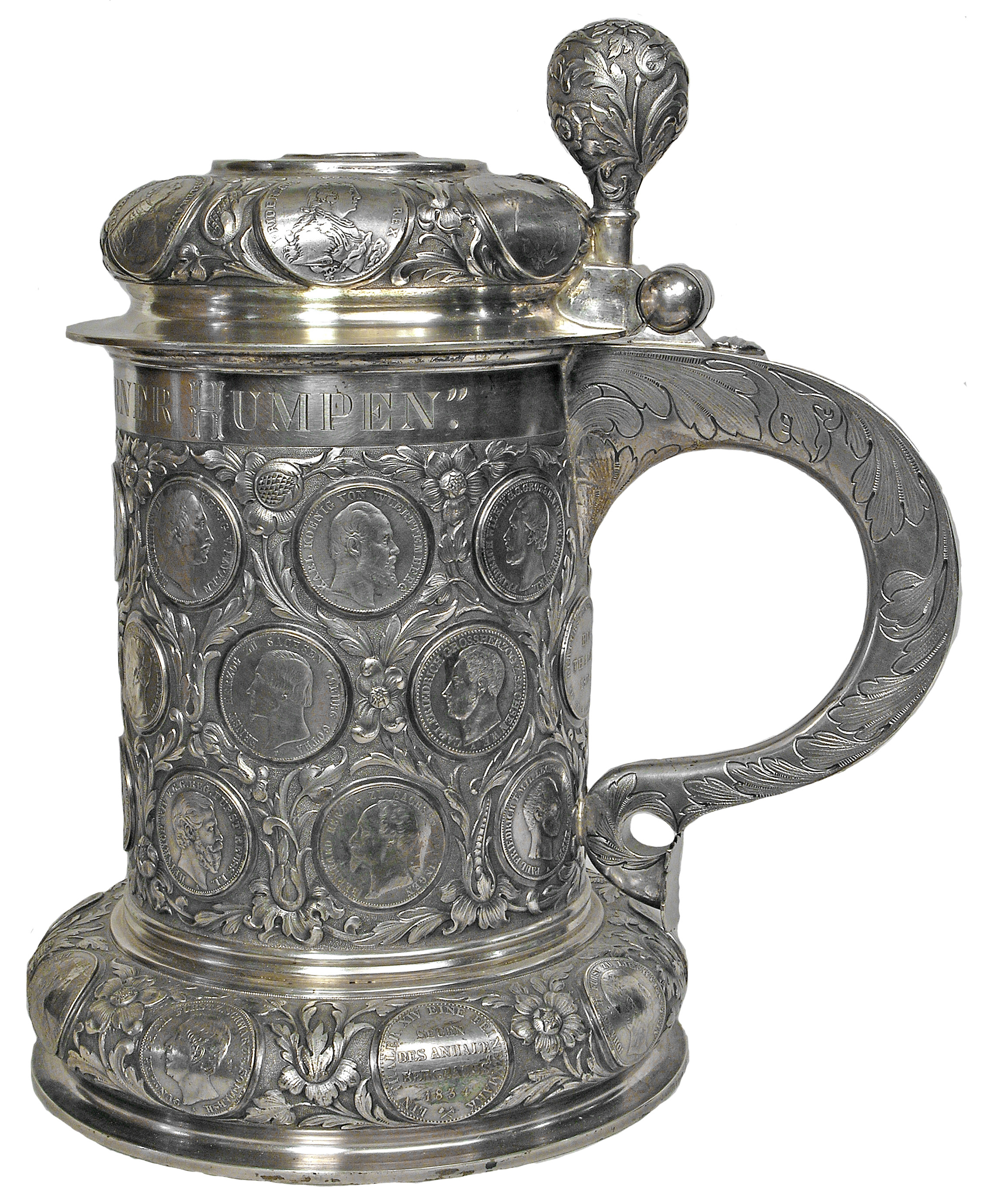 Кубок з німецькими монетами. ХІХ ст. Фірма "Wagner & Sohn". Музей історичних коштовностей України